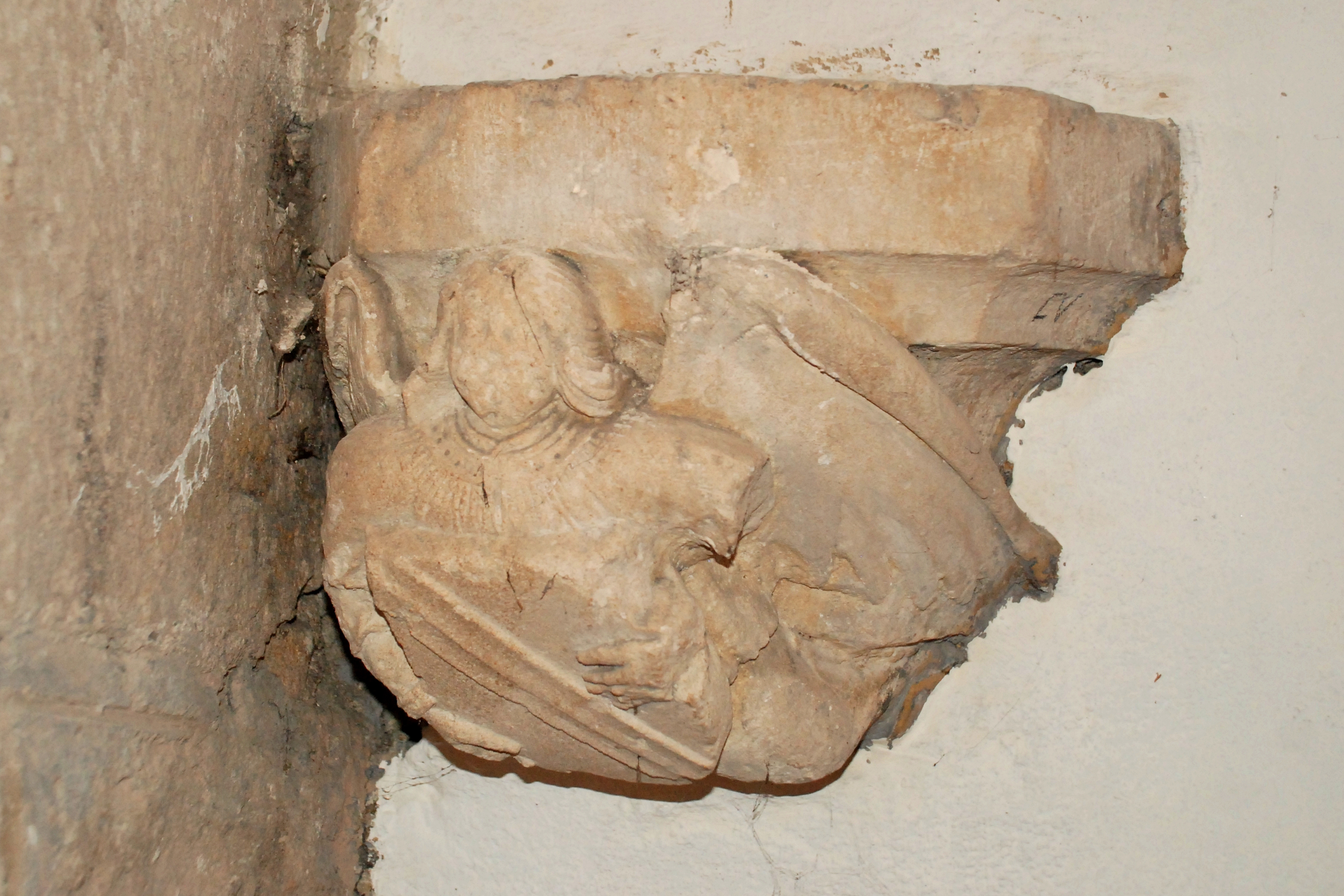 France - Bourgogne - Saône-et-Loire - Tournus - église Saint-Valérien .